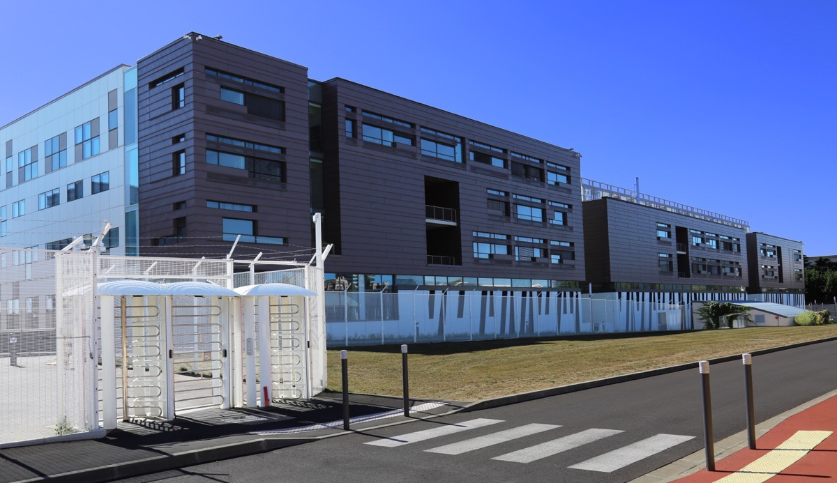 Vue générale de l'Institut de Recherche Criminelle de la Gendarmerie Nationale